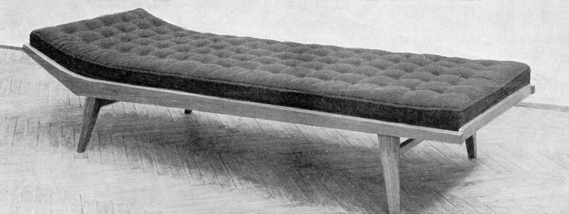 Tapczan - projekt Instytutu Wzornictwa Przemysłowego